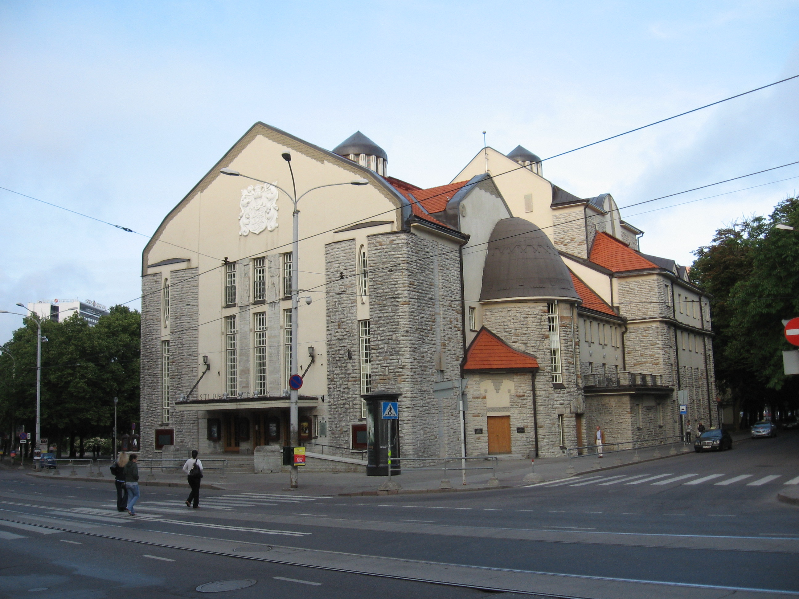 Tallinna Saksa Teatri hoone